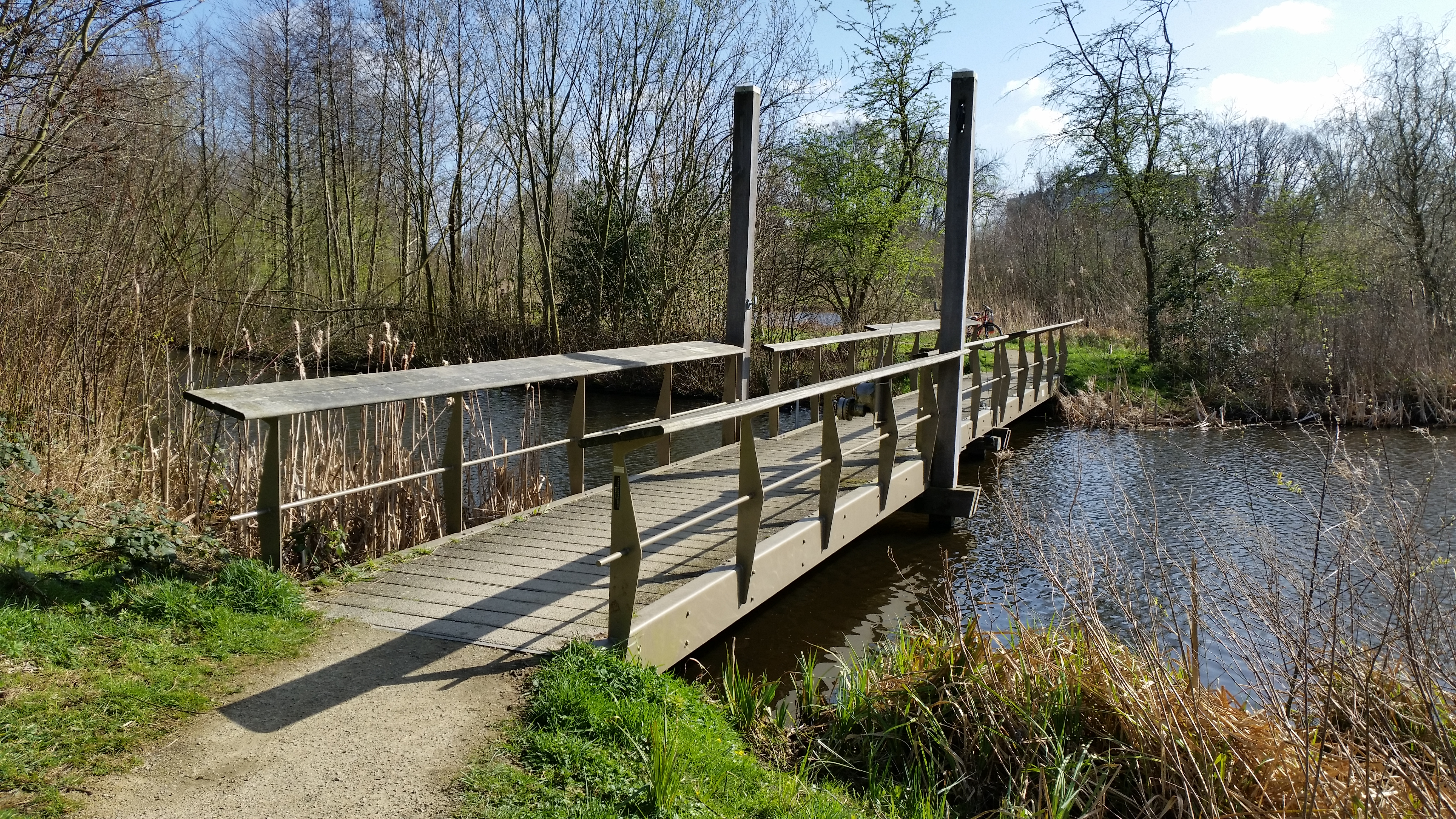 Impressie van Brug 850 in 't Kleine Loopveld, Amsterdam-Buitenveldert (maart 2020)